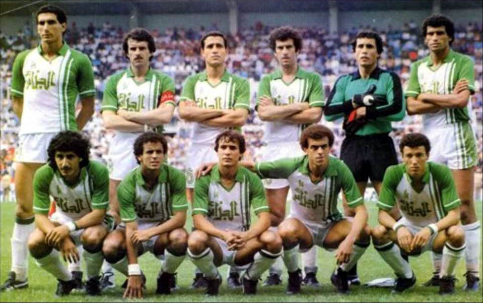 algerie1982